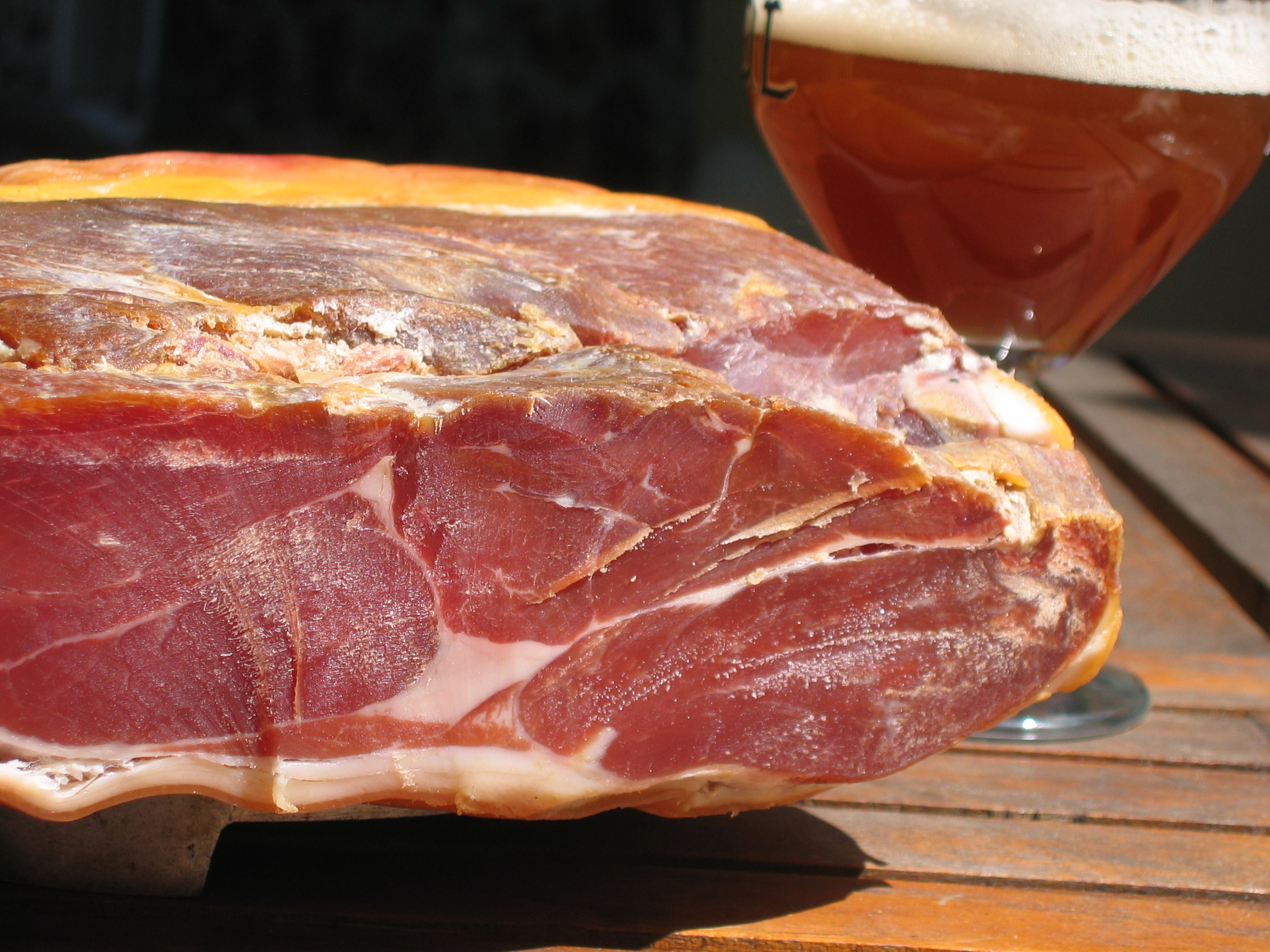 Jamon sec d'Ardennes (France)